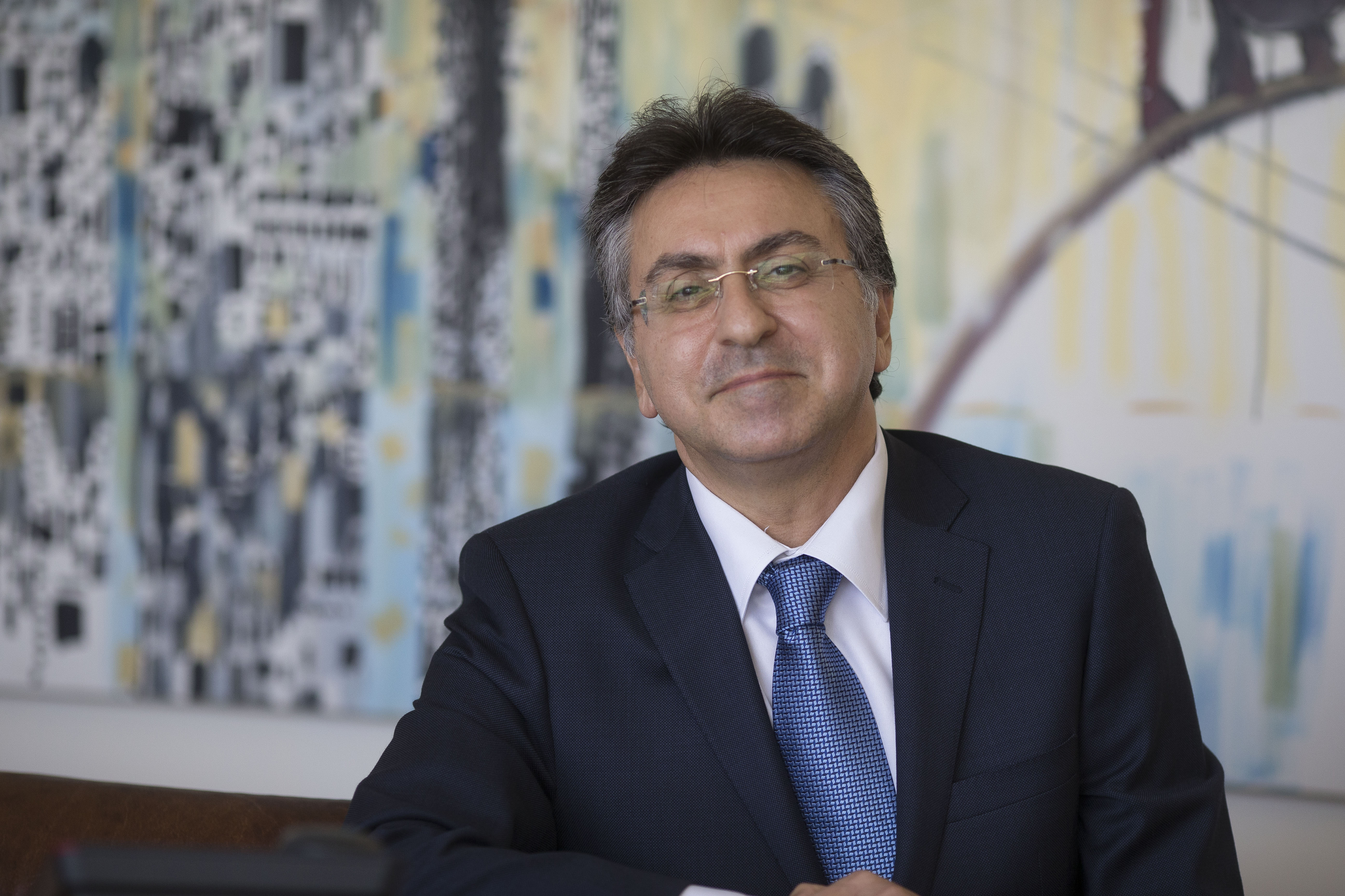 עו"ד מוטי בניאן